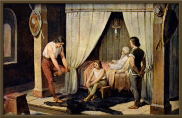 Josef Mathauser - Svatopluk a jeho synové